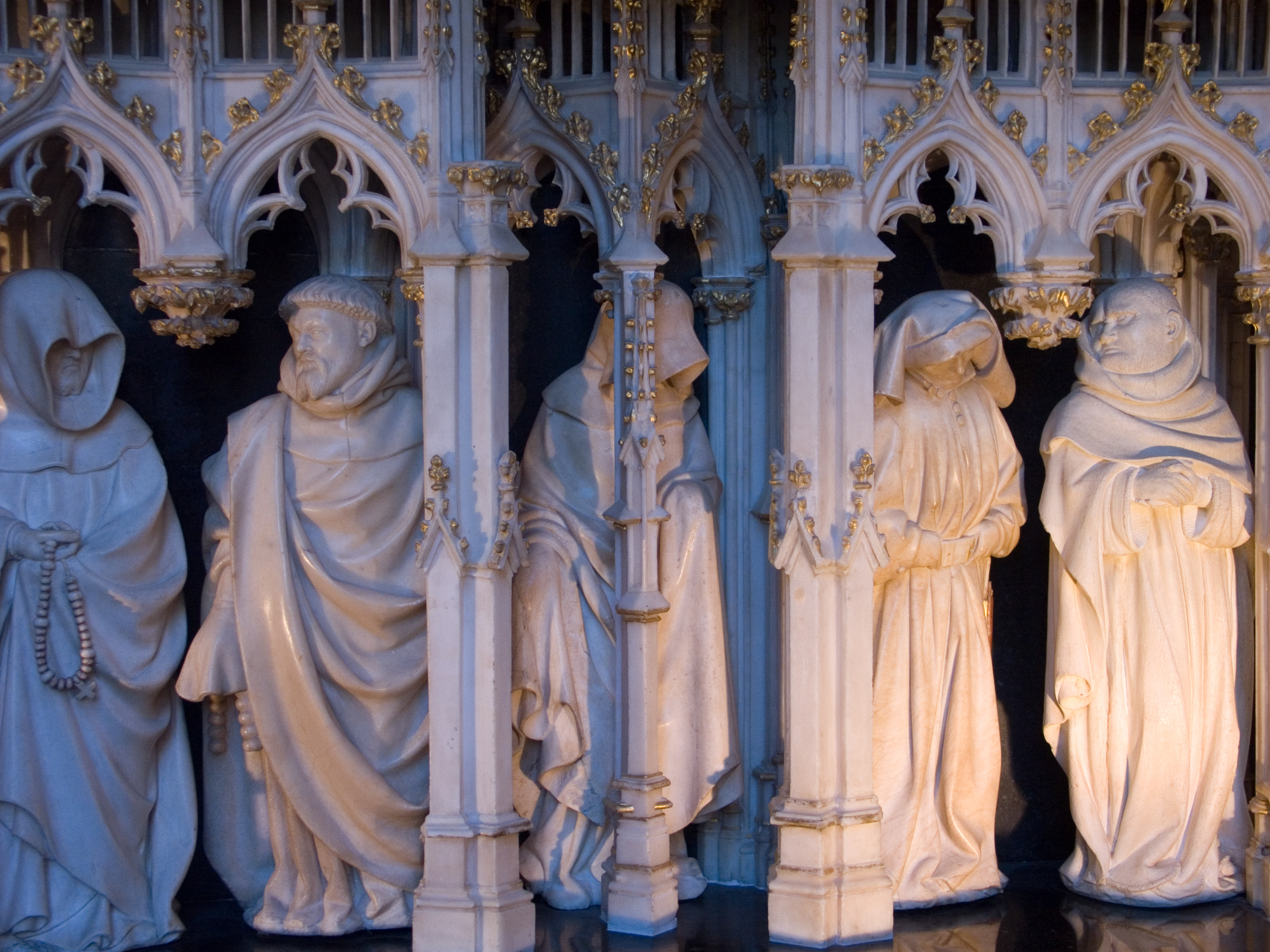 Détail d'un tombeau de la salle des gisants, dans le Palais des Ducs de Bourgogne, à Dijon